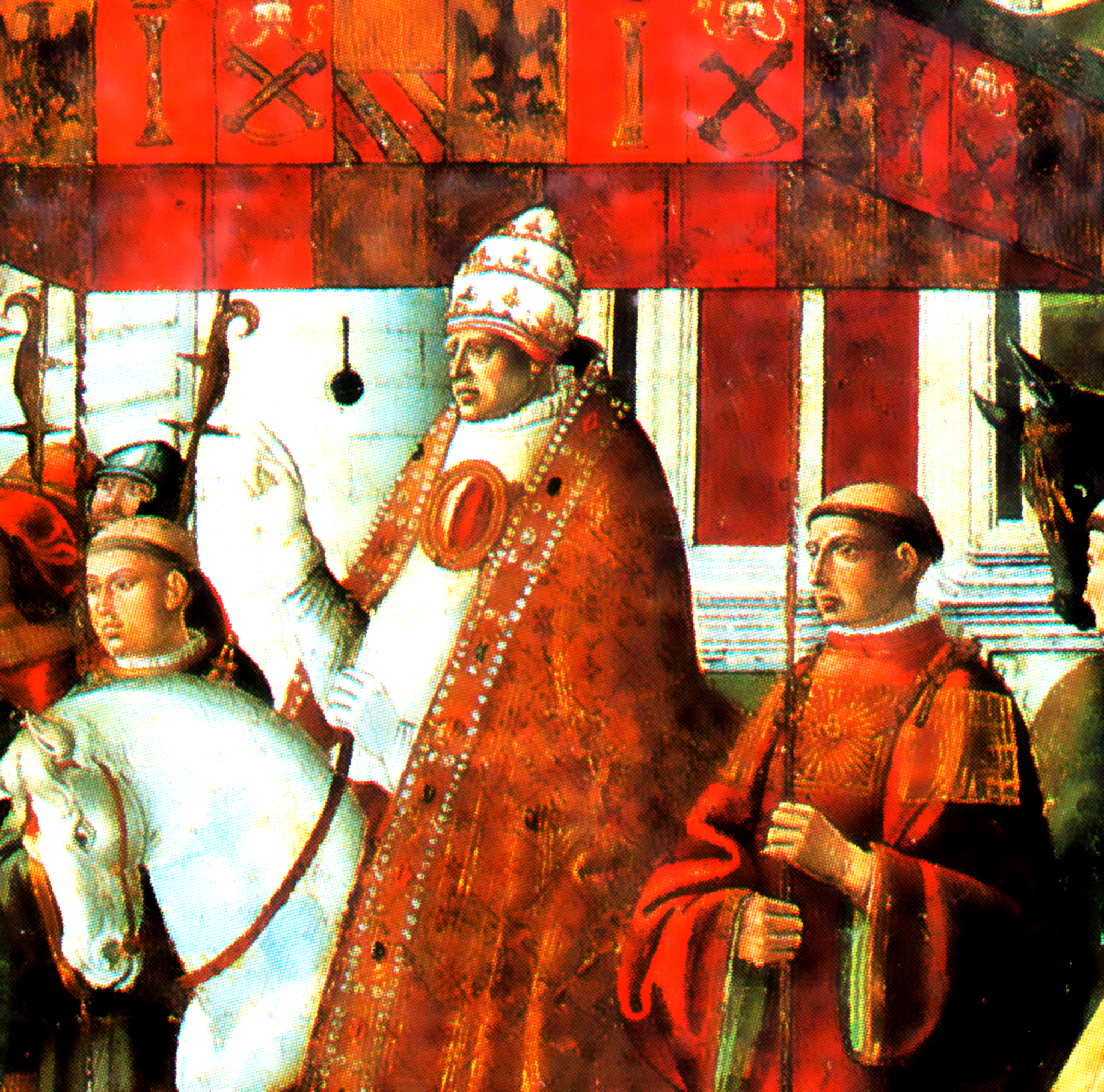 Portrait de Grégoire XI par Girolamo di Benvenuto